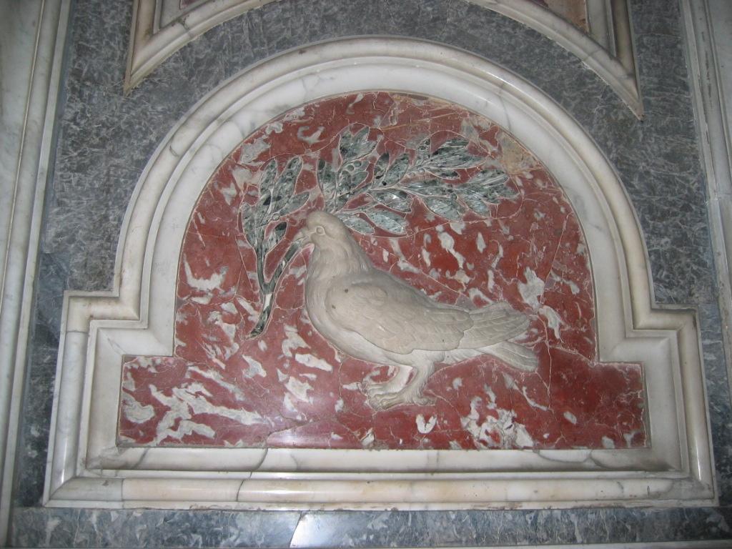 Peterskyrkan, Rom: Marmordekoration - duva.